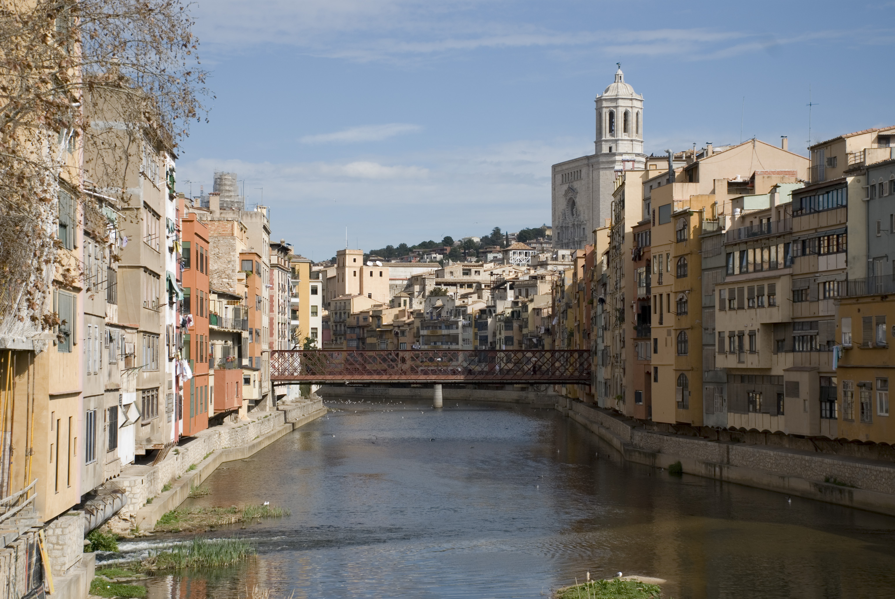 Vista típica del riu Onyar al seu pas per Girona Camera data Camera Nikon D80 Lens Nikon AF-S DX 18-135 mm Focal length 48 mm Aperture f/5.6 Exposure time 320 s Sensivity ISO 100